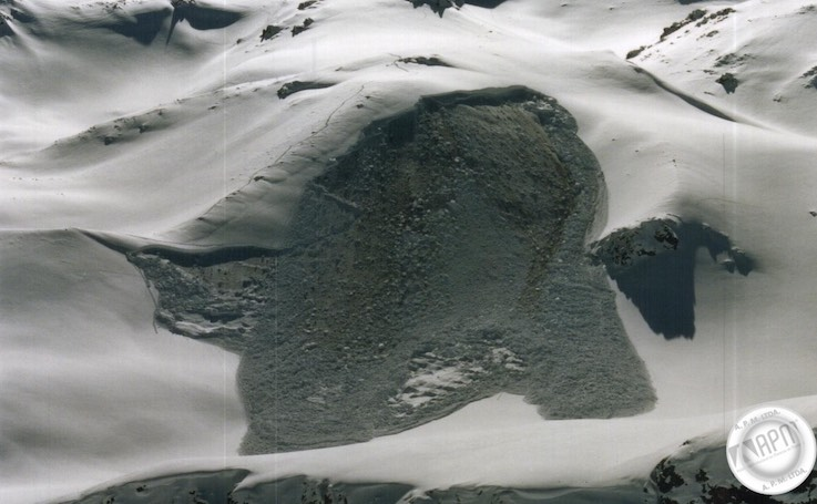 El 17 de junio del 2005, siendo las 12:10 pm., en la cordillera de los andes, lado argentino, sector cercano al campamento de Mina Veladero, un guanaco provocó esta avalancha. Es una senda de exposición sur oeste, con una zona de inicio de 37º y un promedio de ángulo de ladera entre 35º y 27º.